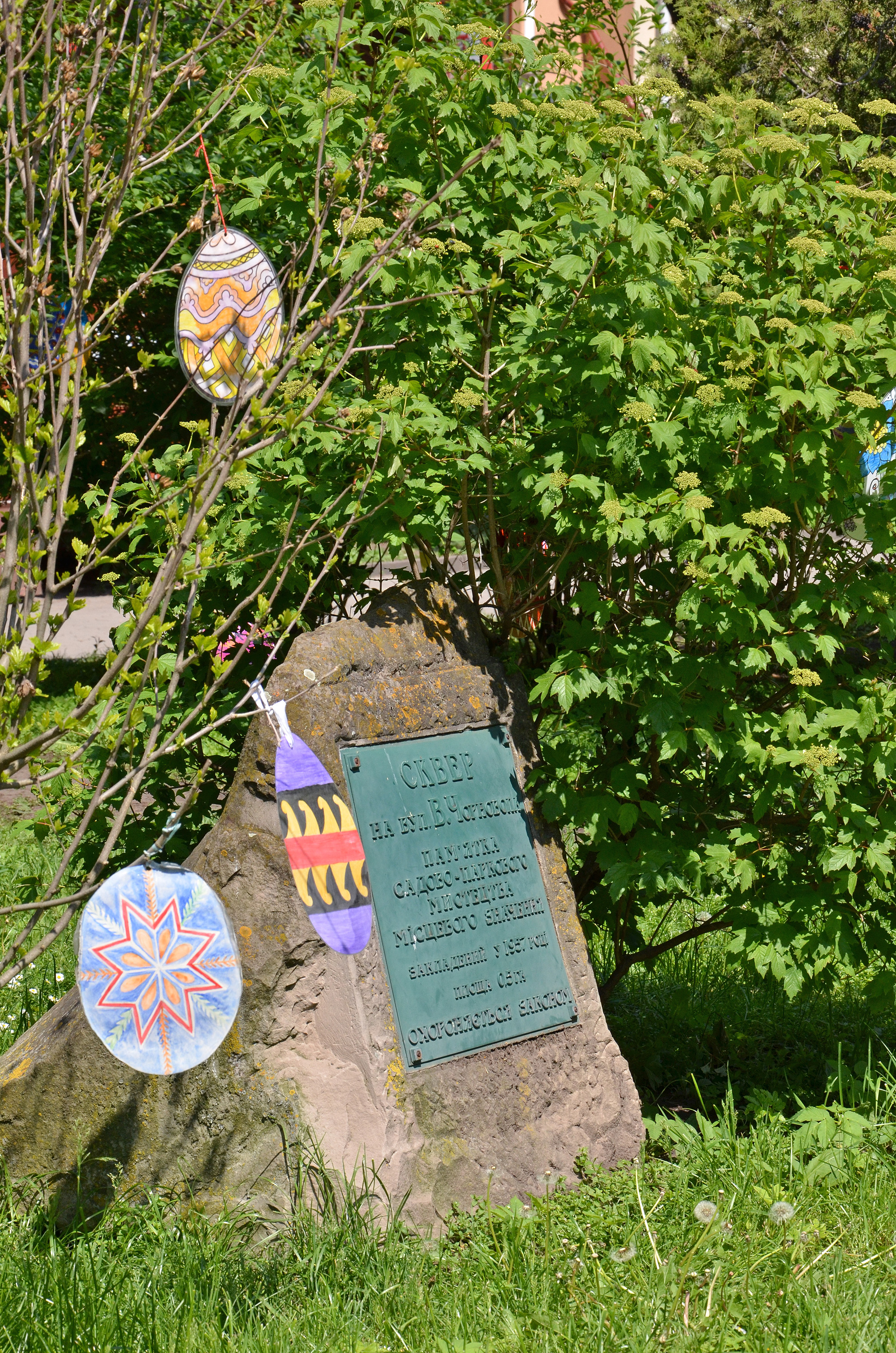 Парк-пам'ятка садово-паркового мистецтва місцевого значення «Сквер по вулиці В. Чорновола» на вул. В'ячеслава Чорновола, між Театральним майданом та вул. Коперника в м. Тернополі. Камінь з охоронною таблицею.